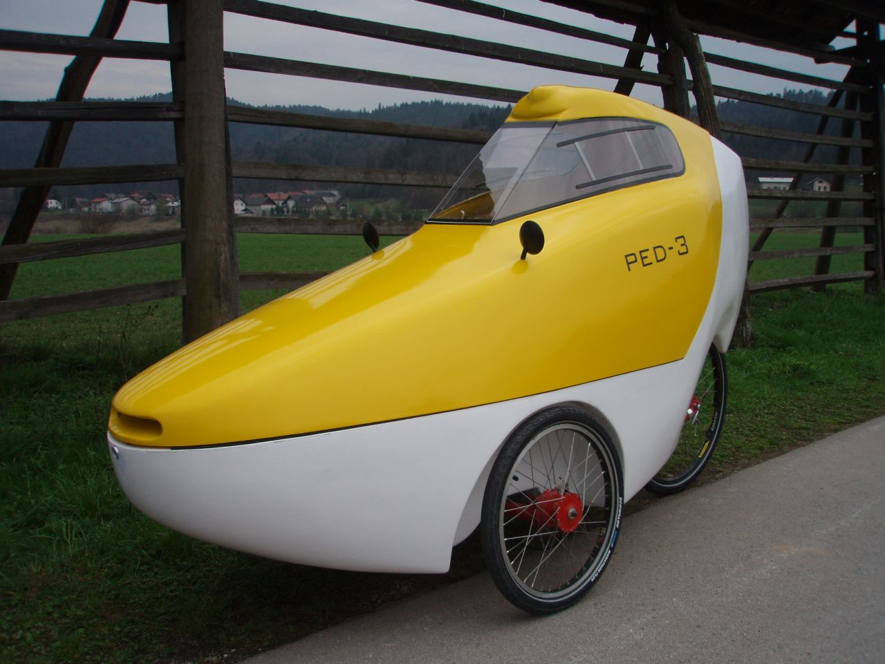 Prvi slovenski velomobil (Silvij Skok, zasebna zbirka)